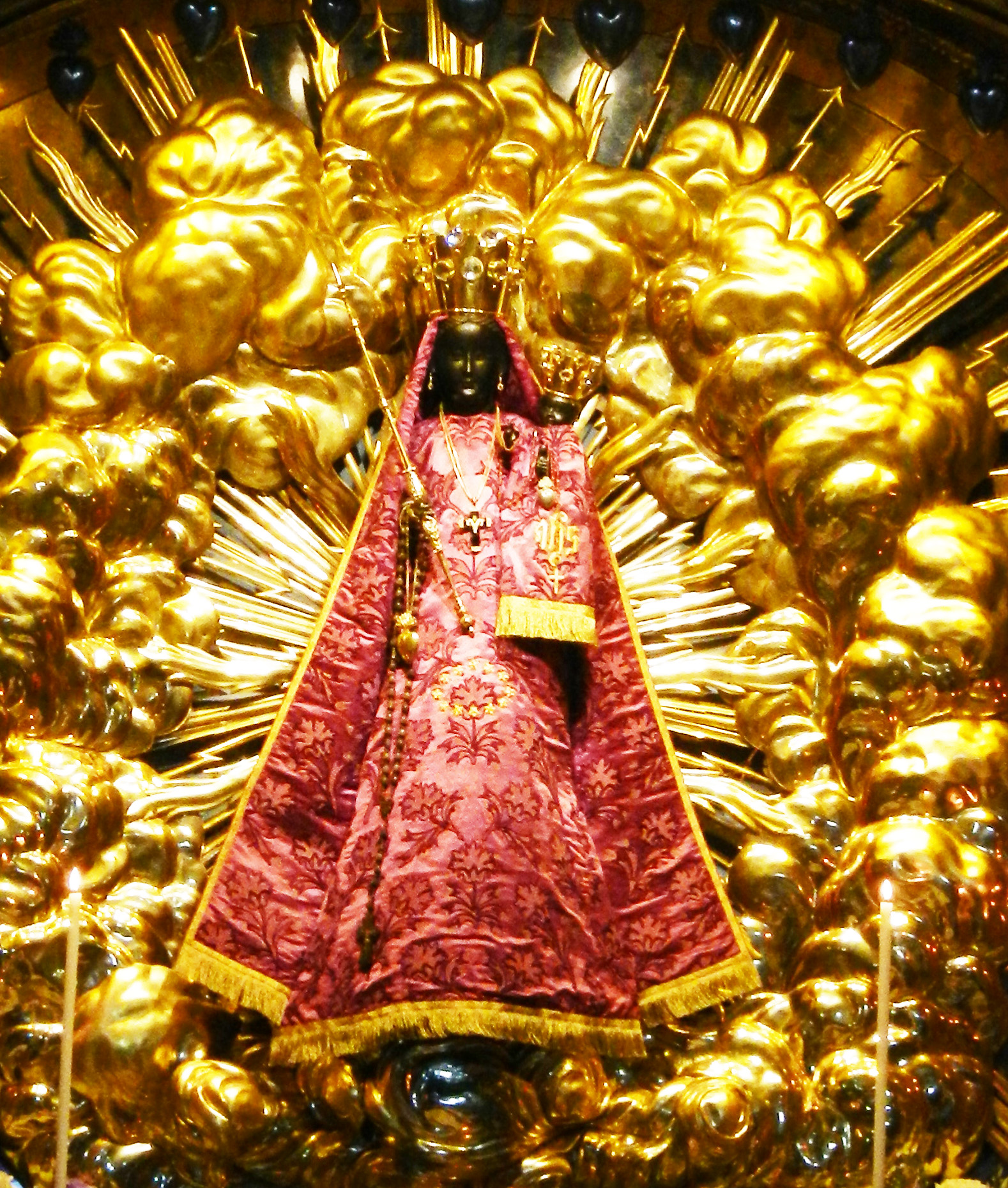 Schwarze Madonna von Einsiedeln, mit Kind. Steht in der Klosterkirche von Einsiedeln in der Schweiz. Liegt an einem Weg der Jakobspilger.